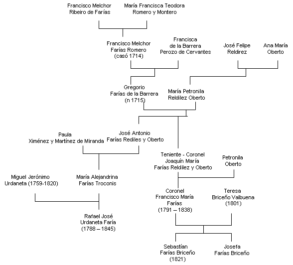 Árbol genealógico de Francisco María Farías, prócer de la guerra de independencia de Venezuela, nativo de Los Puertos de Altagracia